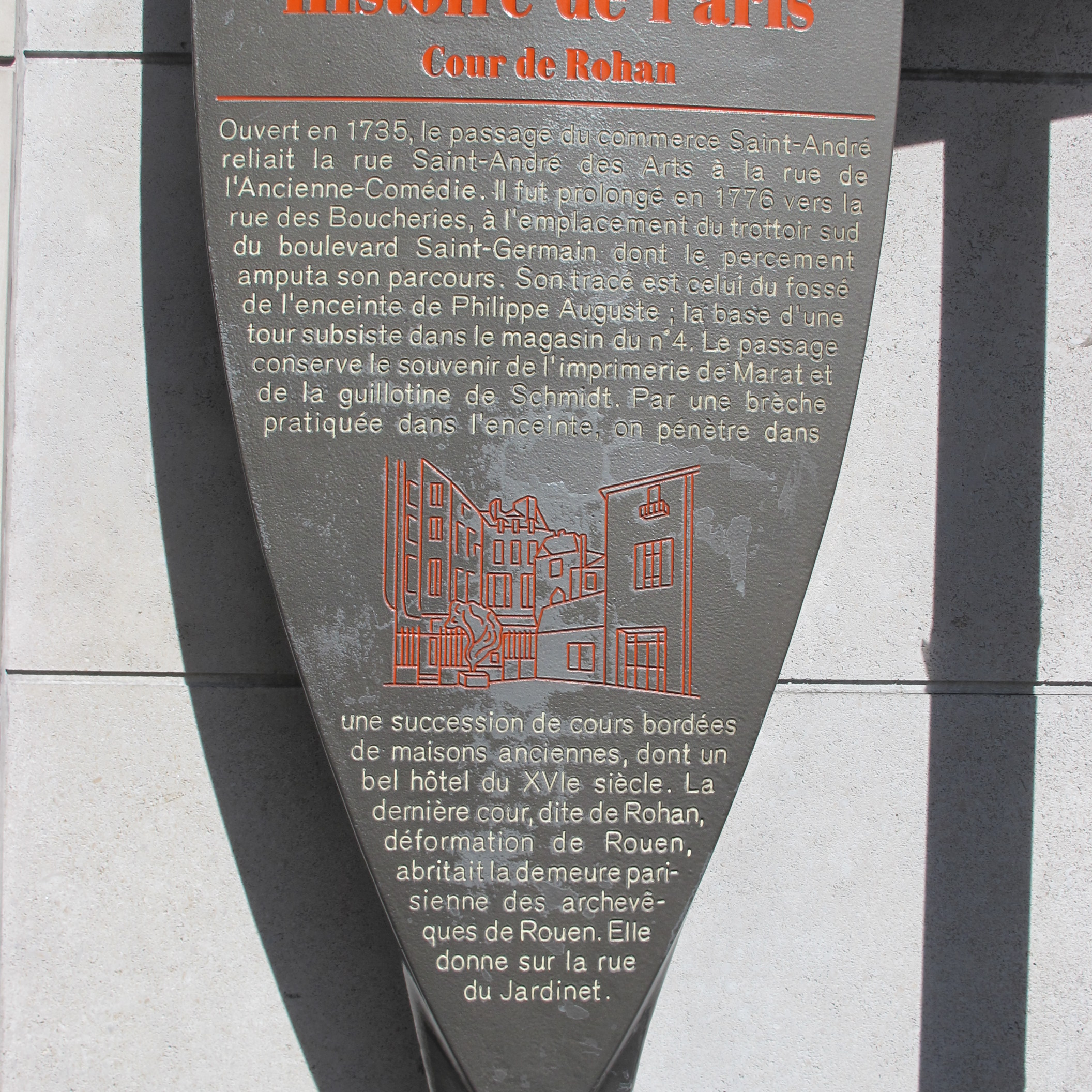 Panneau Histoire de Paris